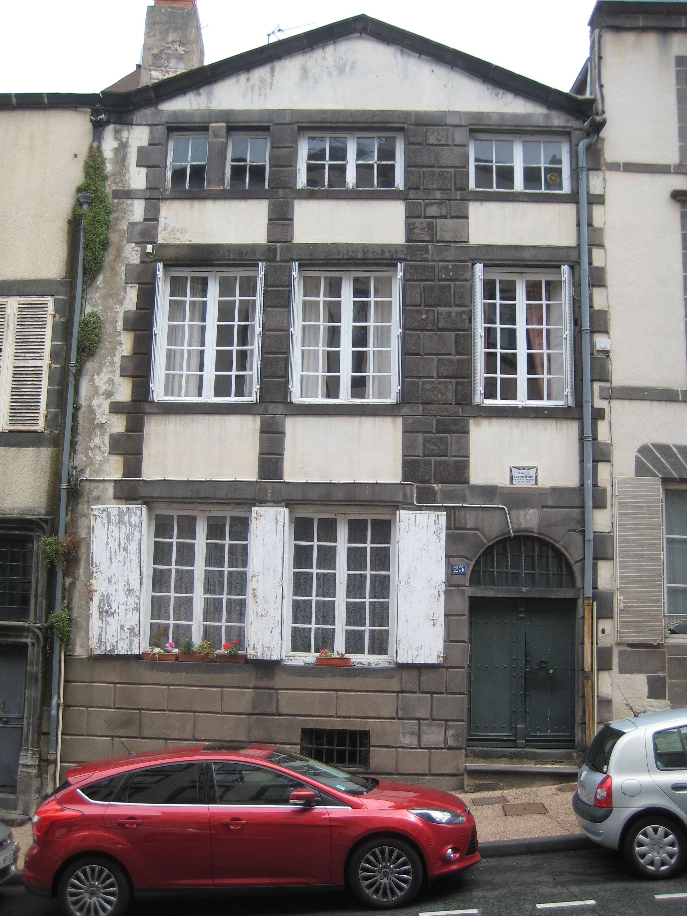 Maison natale de Charles-Gilbert Romme, 25 rue de l'horloge, Riom